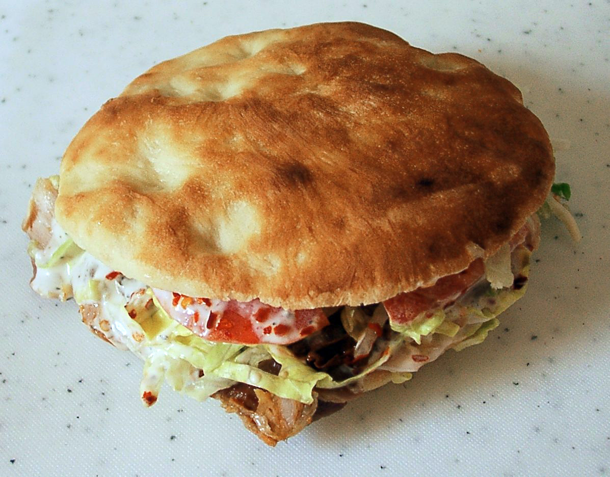 Doener.